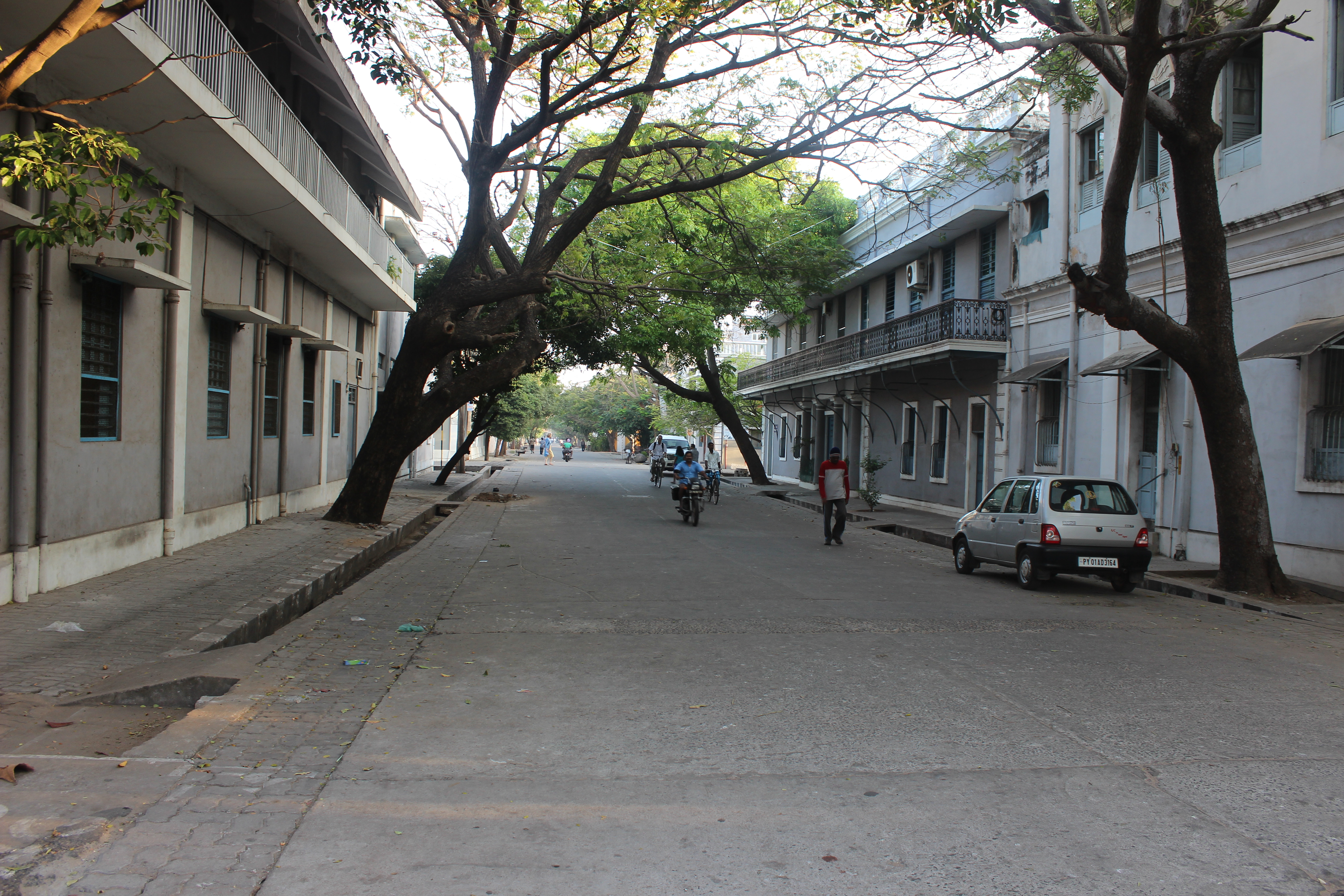 ஓயிட் டவுன், புதுச்சேரி